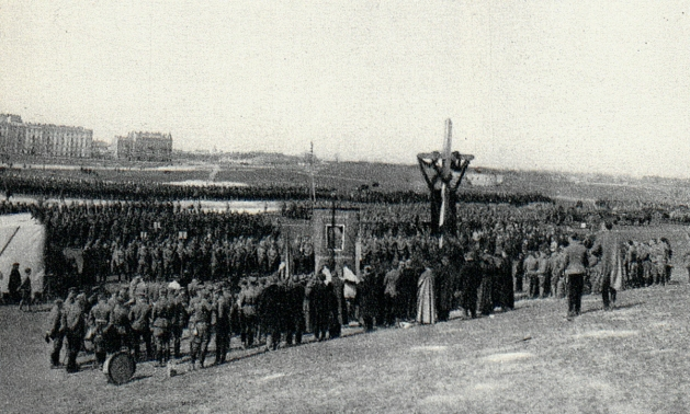 Msza polowa z okazji poświęcenia Krzyża Traugutta. Cytadela Warszawska.